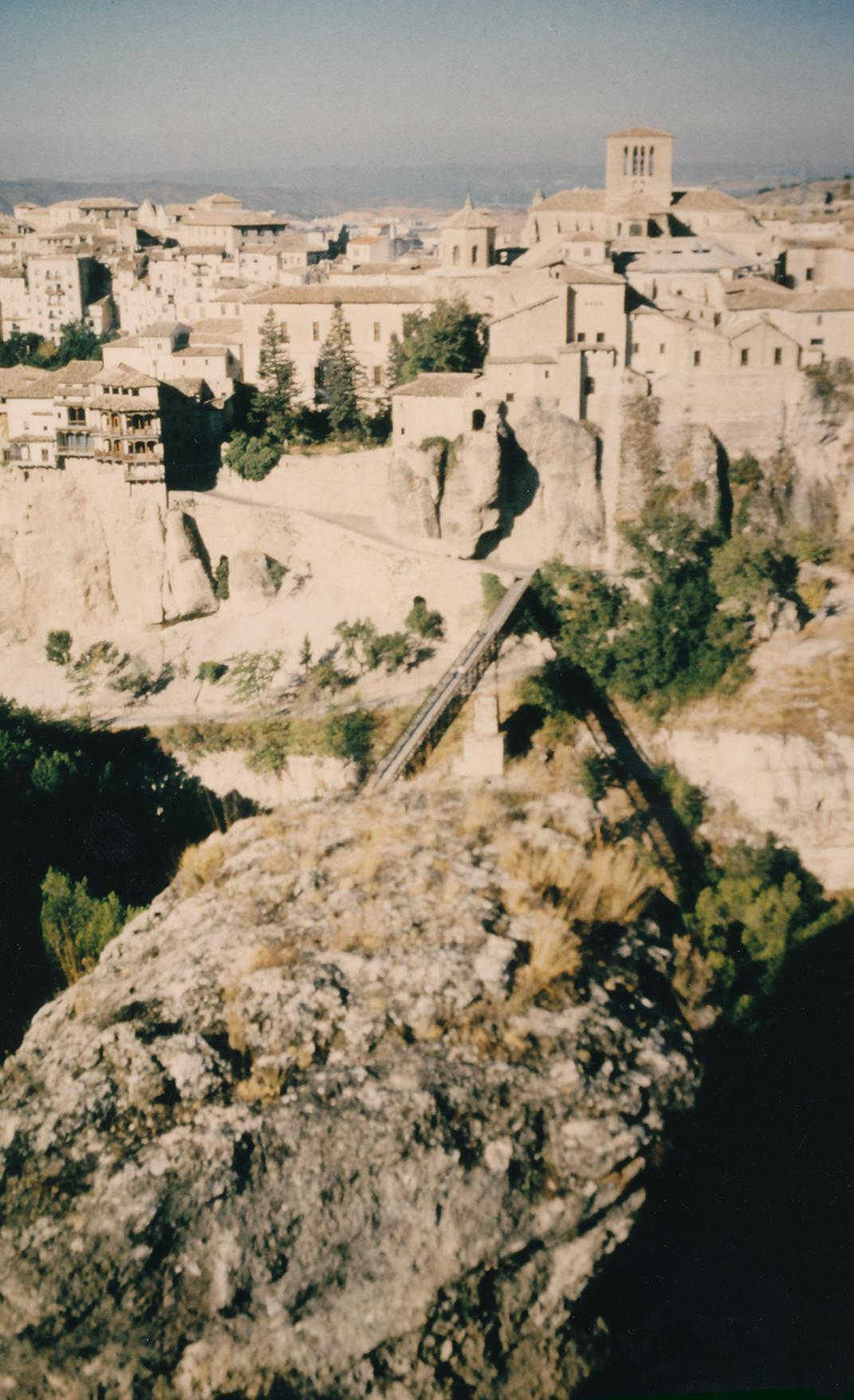 Blick über Cuenca (und die "hängenden Häuser") Datum: 10/1986 Urheber: Michael Pfeiffer Quelle: privates Fotoalbum des Urhebers